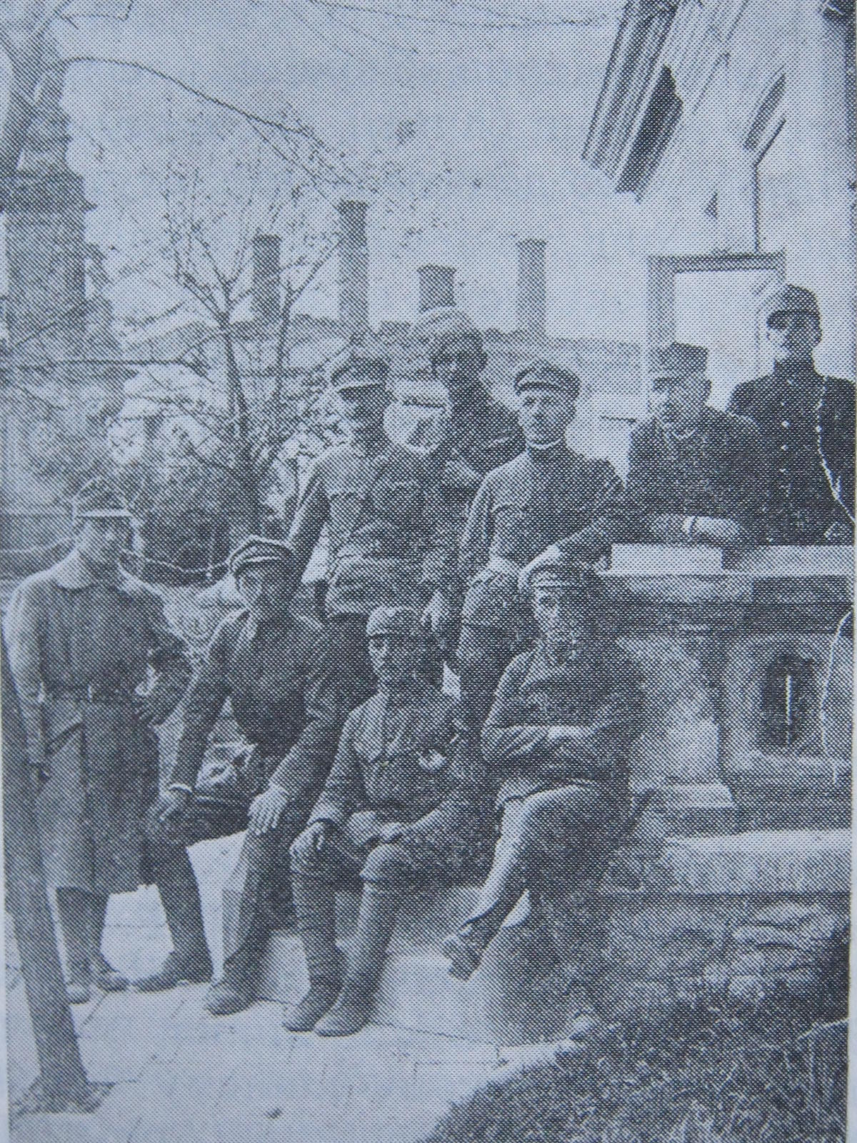 Вояки УГА в Бучачі, 1919 р.